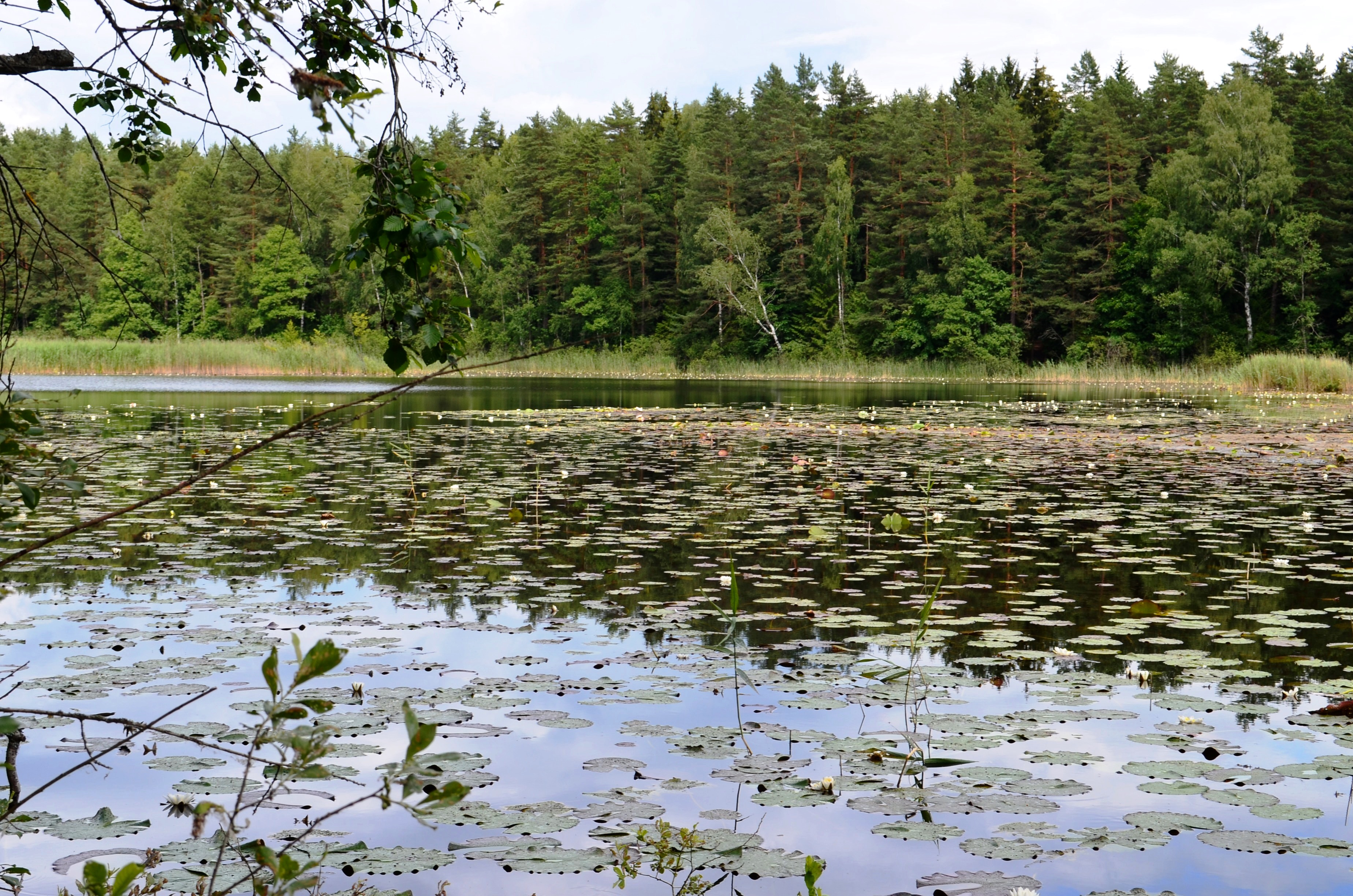 Sausas ežerėlis iš pietų pusės, Verkių RP, Vilnius